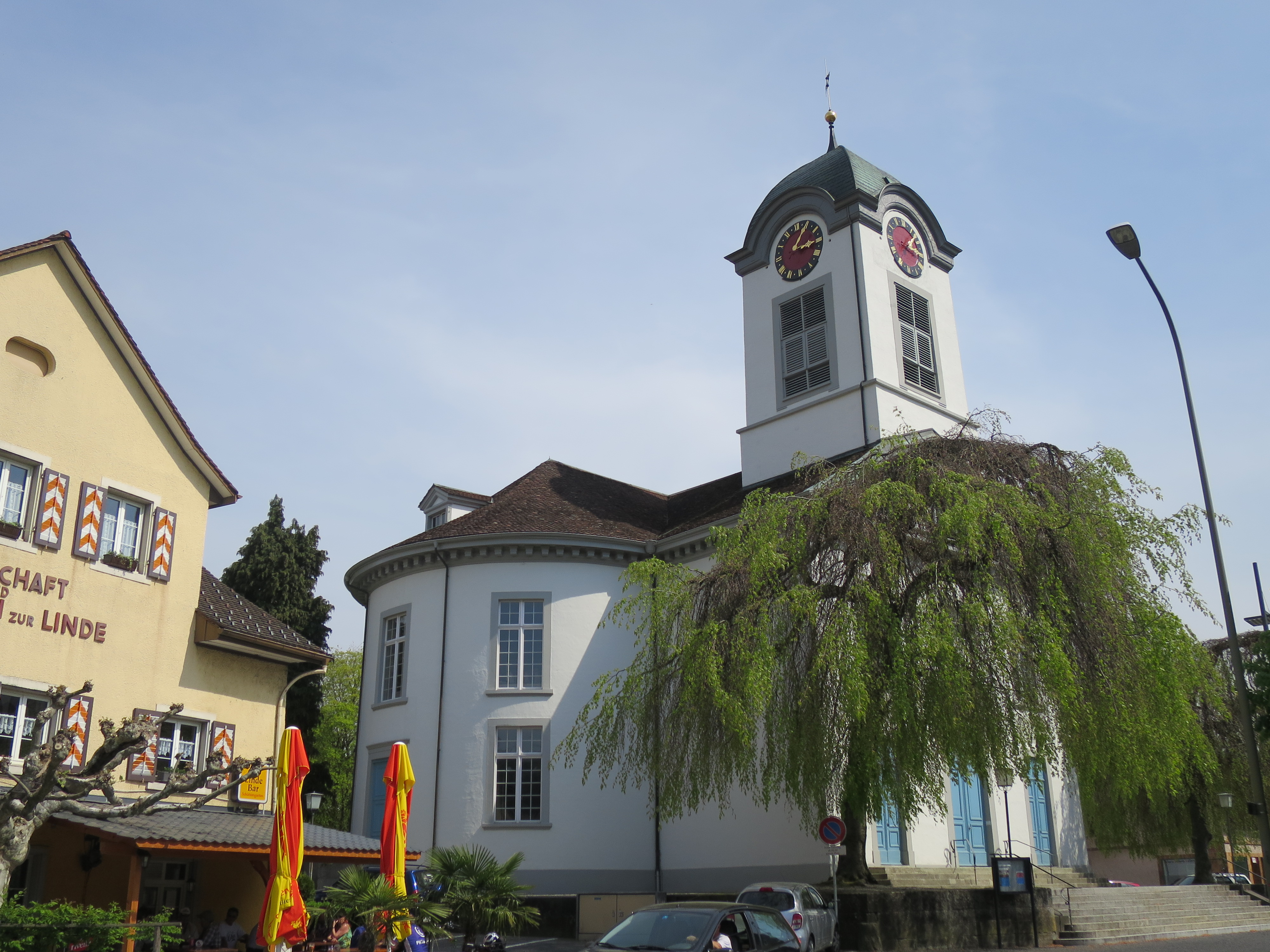 Ansicht der reformierten Kirche Embrach